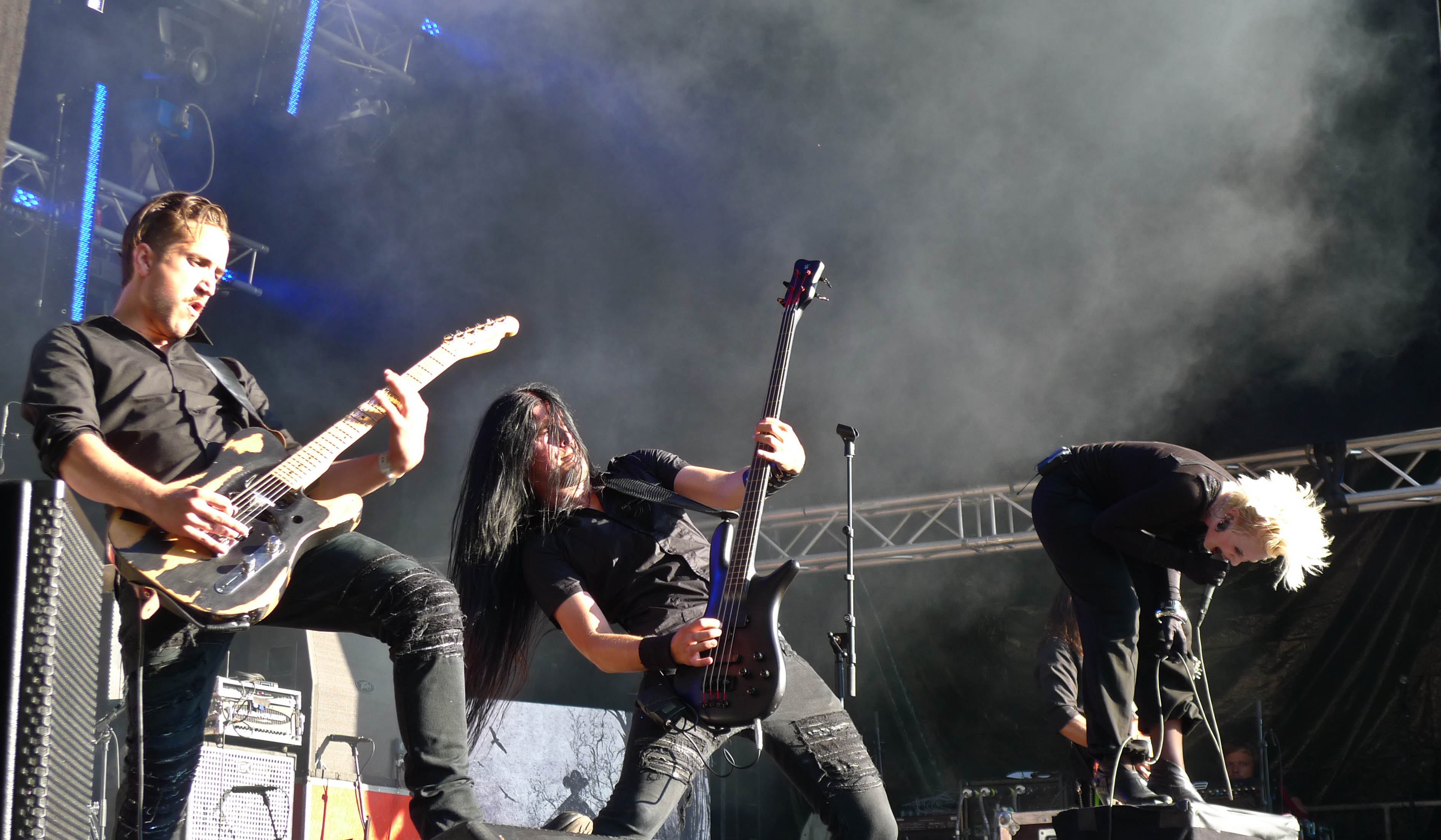 Norwegian band Djerv performing live at Øyafestivalen 2010.